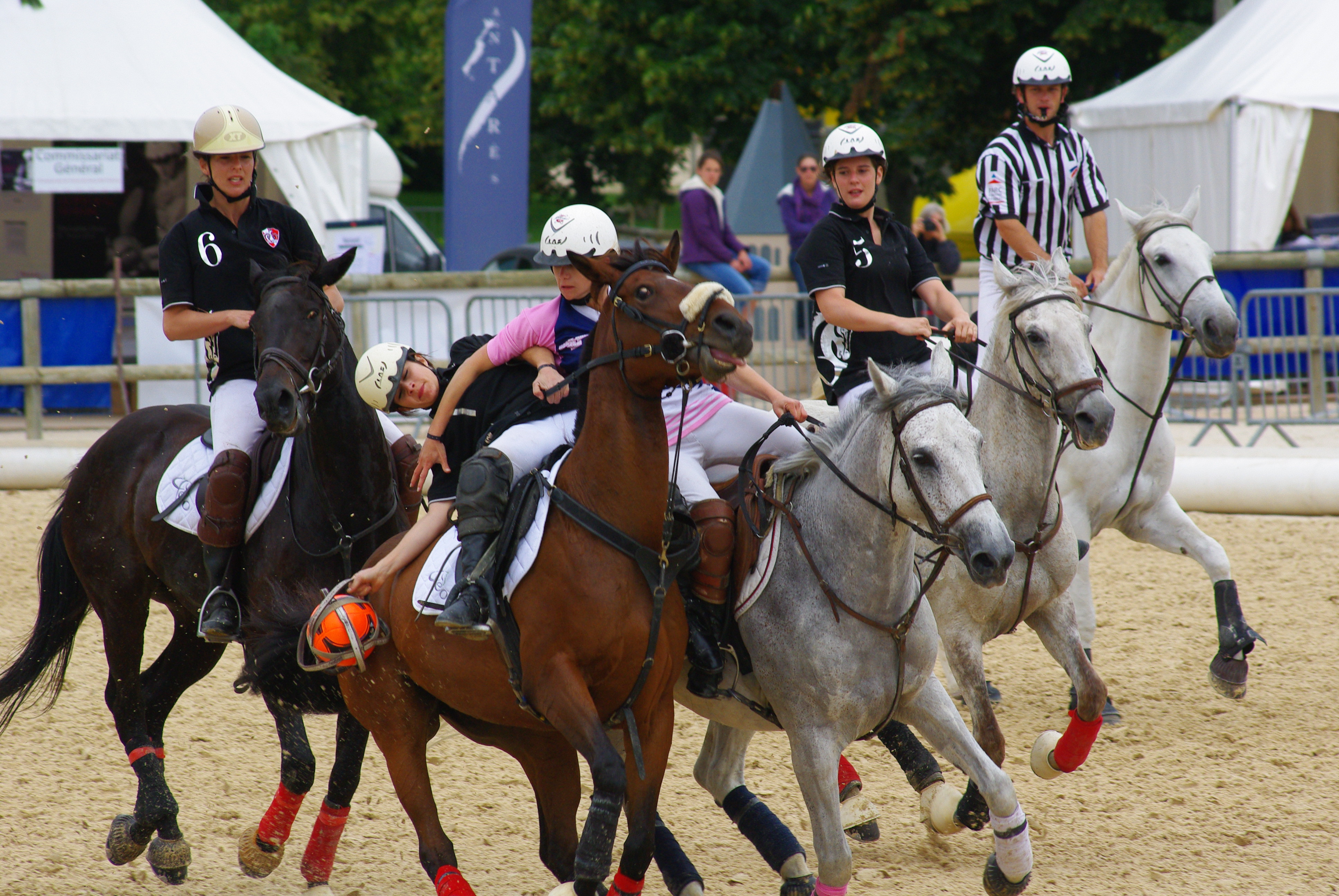 Championnats de France de horseball féminin, Cluny.